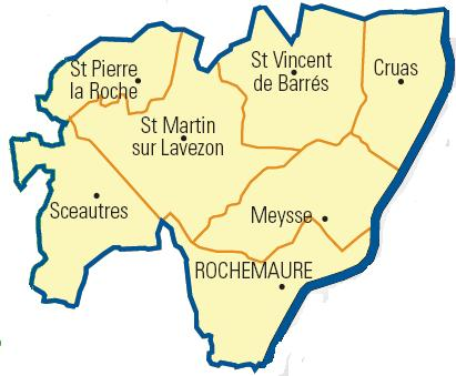 Carte détaillée des communes du canton (Ardèche)